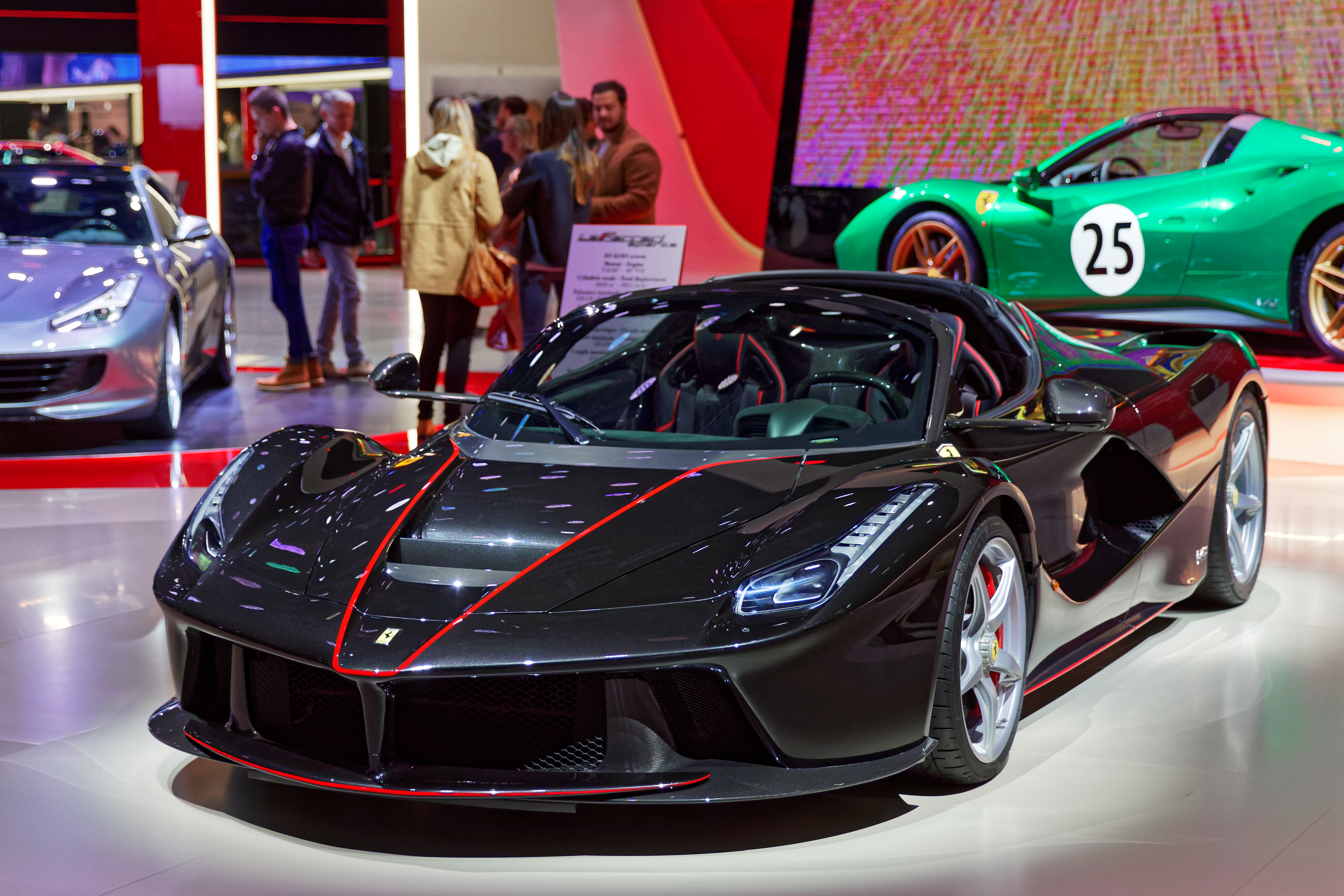 Une Ferrari LaFerrari Aperta présentée lors du mondial de l'automobile de Paris 2016.